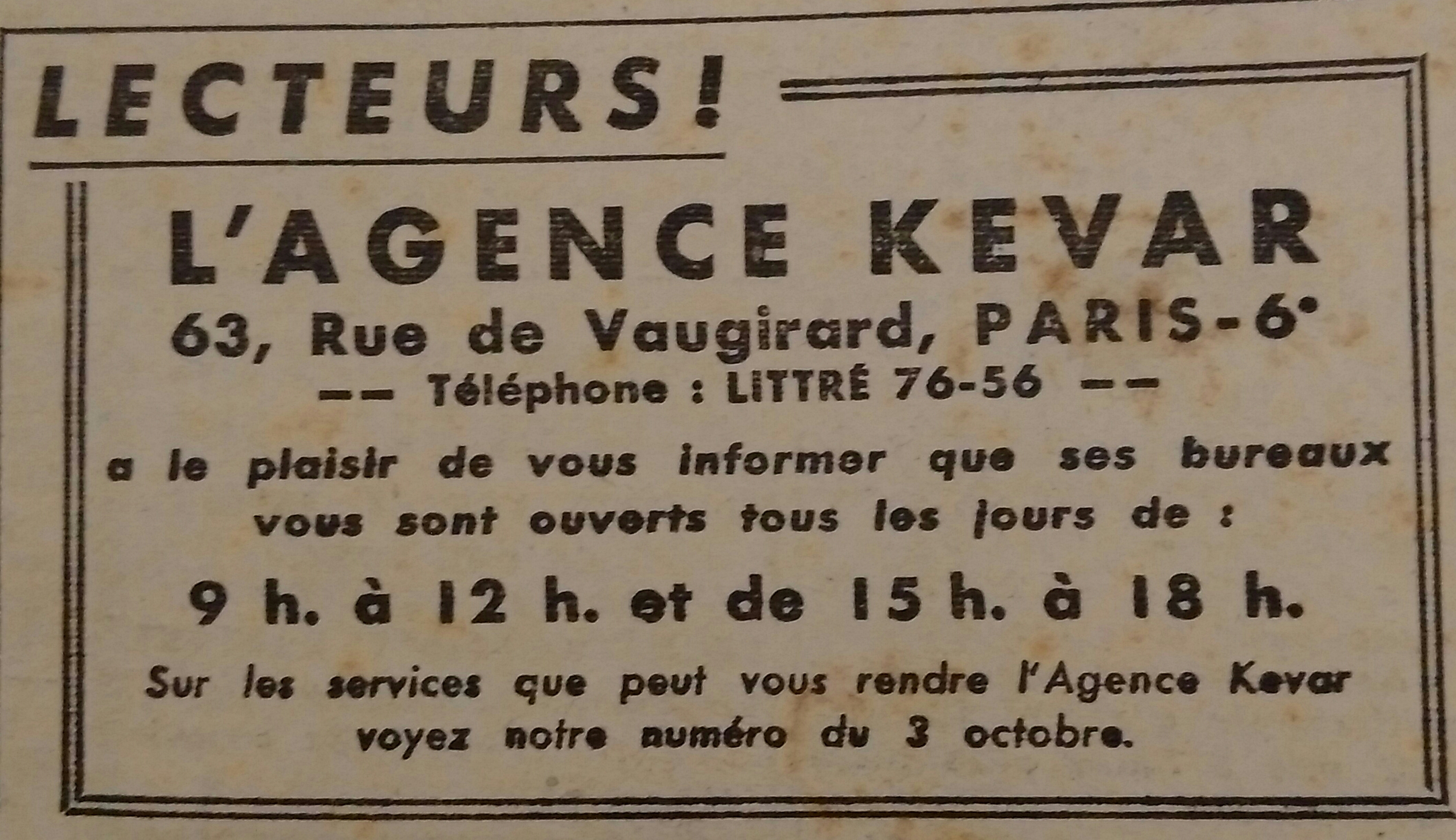 Bruderezh evit ar gevrenn Kevar d'ar Strollad Broadel Breizh er gazetenn l'Heure Bretonne (niverenn 169 bloavezh 1943)